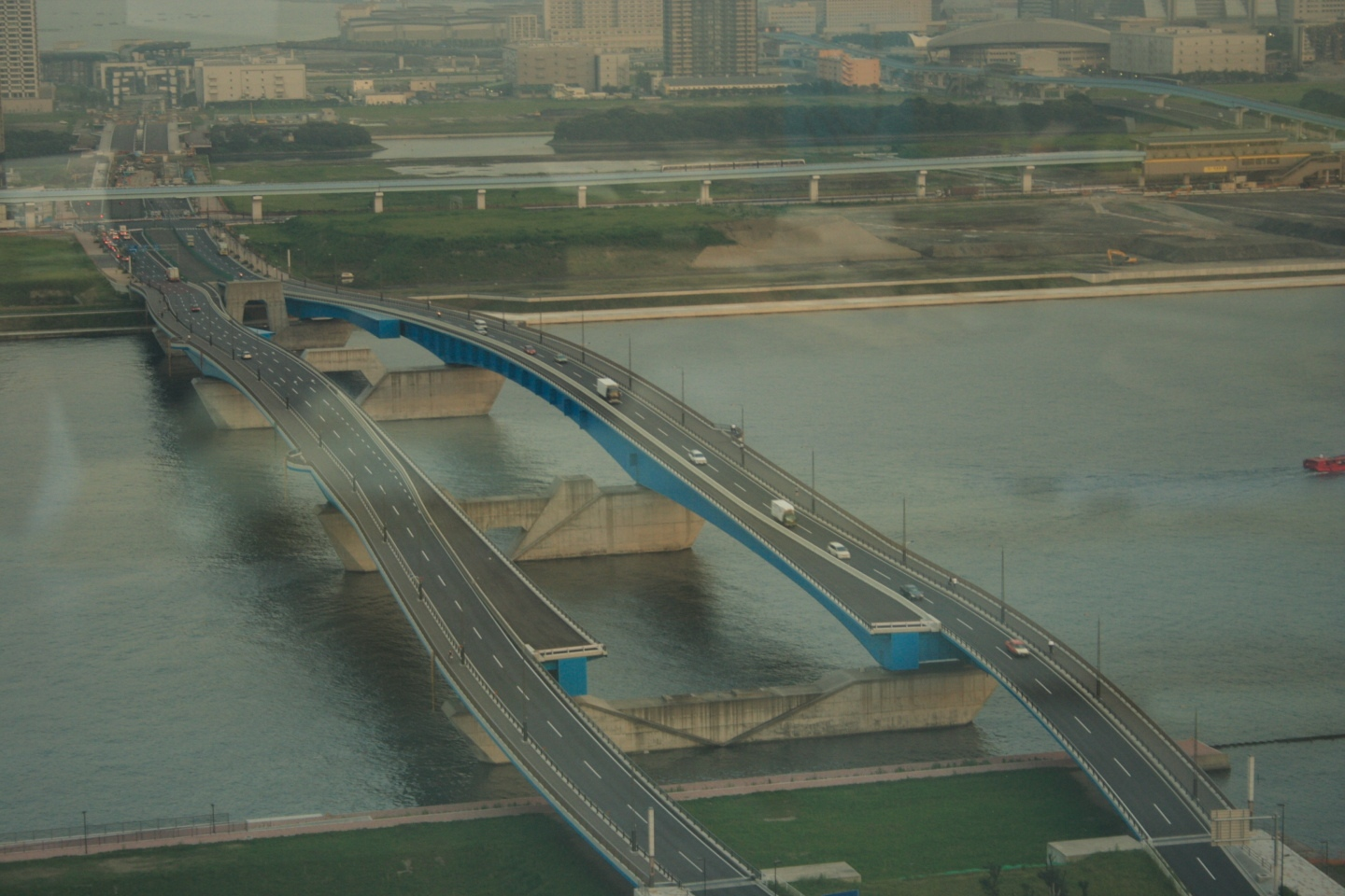 晴海大橋 写真 Hadge撮影 2006年07月27日